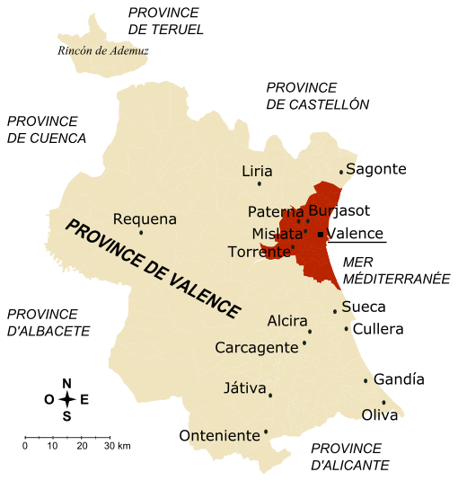 Carte de la province de Valence (Espagne) Le noyau urbain et les communes appartenant à la première couronne de l'aire métropolitaine de Valence sont peints en marron obscur. En leur ensemble, ils concentrent 60,62% de la population provincial en 5,73% de sa surface, avec une densité moyenne de 2.407 hab/km2. Les villes indiquées sur la carte sont celles qui ont plus de 30.000 habitantes (si elles appartiennent à l'aire métropolitaine de Valence) ou de plus de 20.000 habitantes (pour le reste de communes), selon le recensemente de l'Institut National de Statistique Espagnol du 2005. Auteur: Rodriguillo Réalisé à partir de: Image:Valencia - Mapa municipal.svg Autres versions: español, english